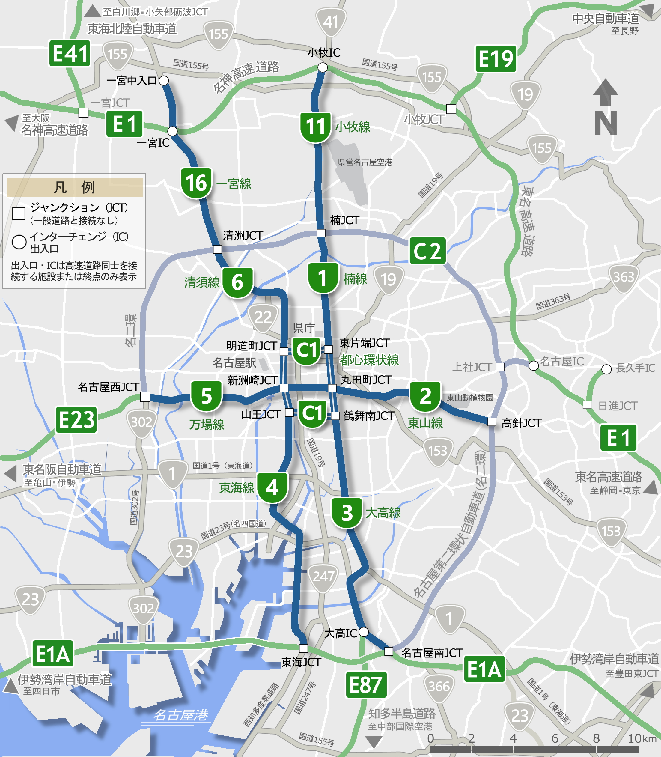 名古屋高速路線図